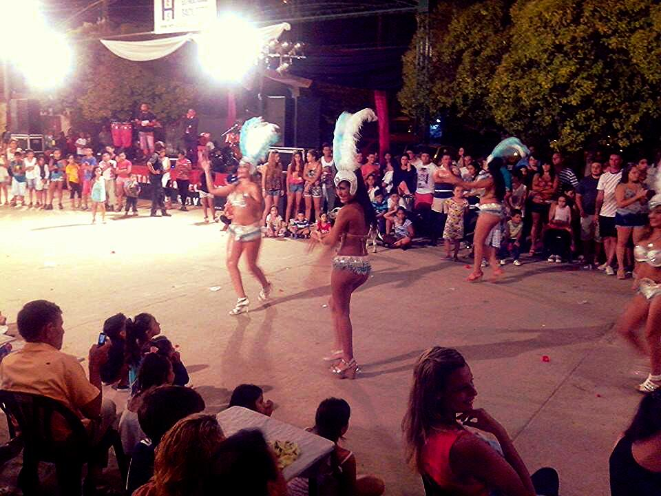 Vista espontanea del Carnaval.